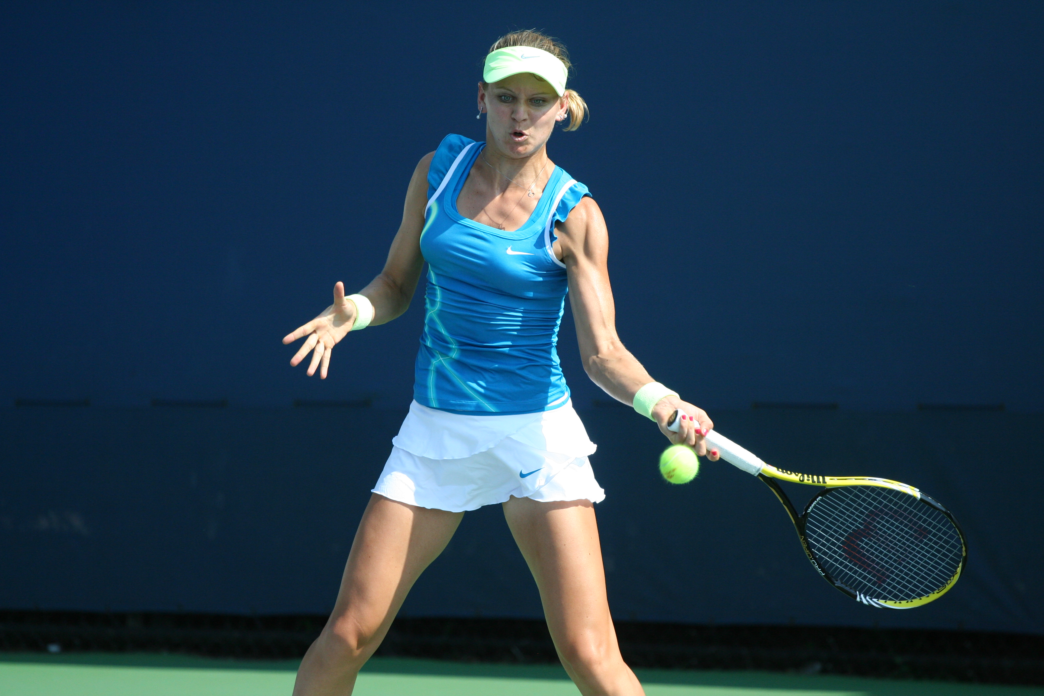 U.S. Open Aug. 31, 2010